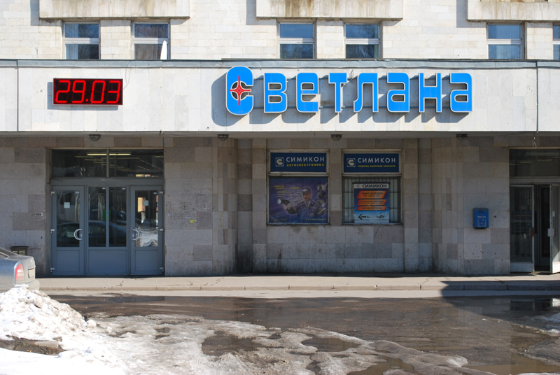 Svetlana factory